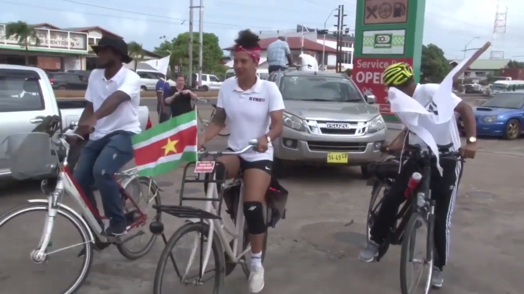 Maisha Neus en Peter Wolff, 2020